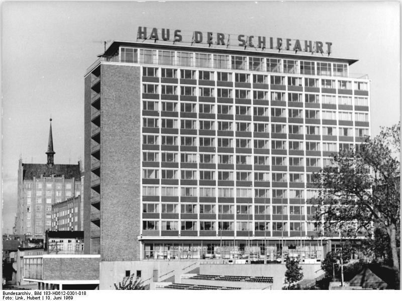 Rostock, Haus der Schifffahrt Zentralbild Link 10.6.1969-Rostock - Tor zur Welt - Lange Straße - Haus der Schiffahrt. Der VEB Deutsche Seereederei hat ein neues Domizil. Unter der Bezeichnung "DSR-Lines" bieten gegenwärtig 162 moderne Frachtschiffe der Deutschen Seereederei mit einer Tragfähigkeit von rund 1.049 Millionen tdw ihre Transportleistungen in fast 700 Häfen in circa 100 Ländern der Erde an. Die Deutsche Seereederei unterhält gegenwärtig 14 Liniendienste. Sie ist in bedeutenden internationalen Schiffahrtorganisationen vertreten, beispielsweise der "Baltic and International maritime conference" (bimco).